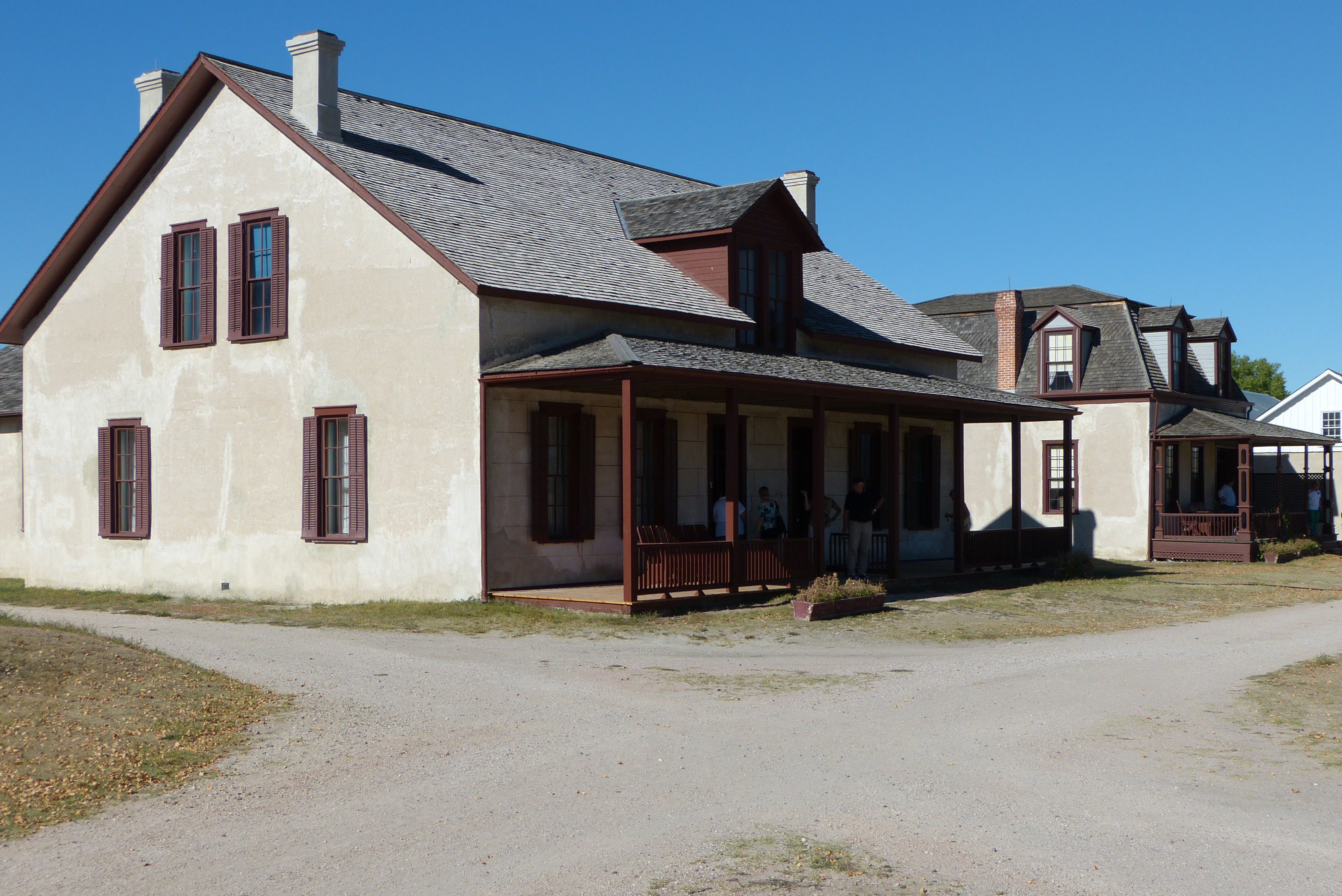 Typische Offiziershäuser in Fort Laramie NHS